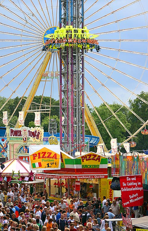 Dichtes Gedränge auf der Annakirmes 2005.